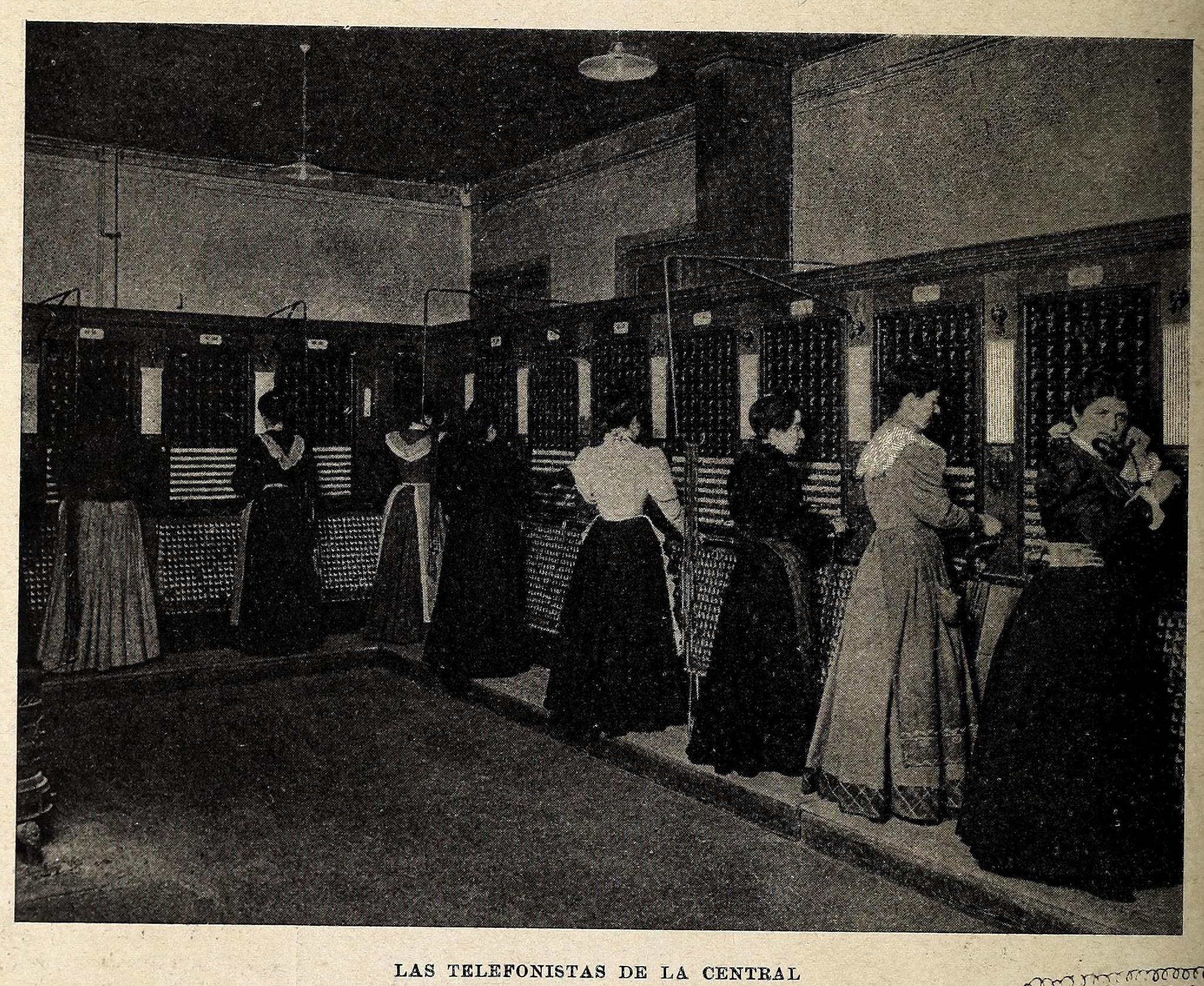 Las telefonistas de la central.